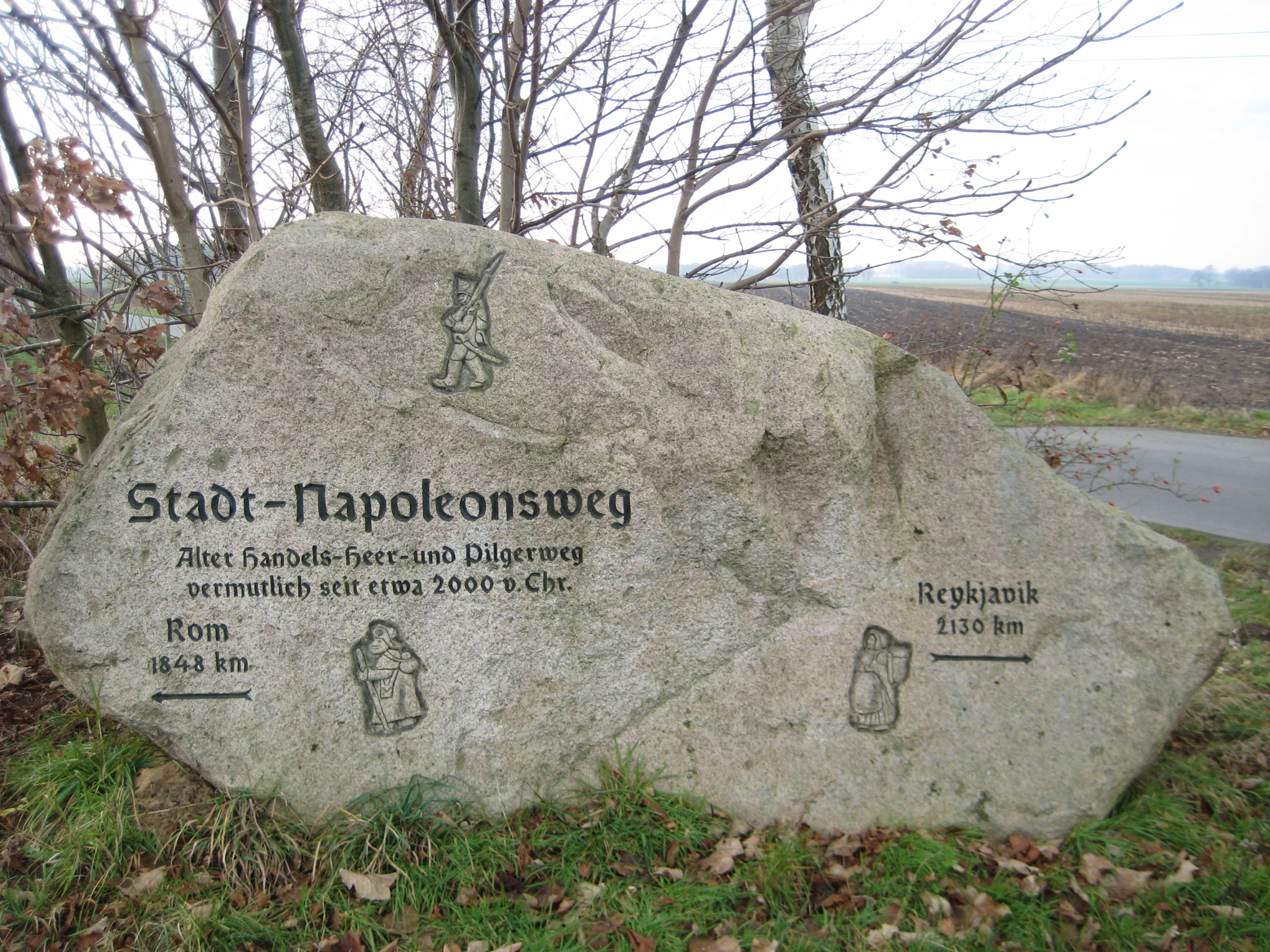 Napoleonstein in Ahlerstedt-Ottendorf, Samtgemeinde Harsefeld